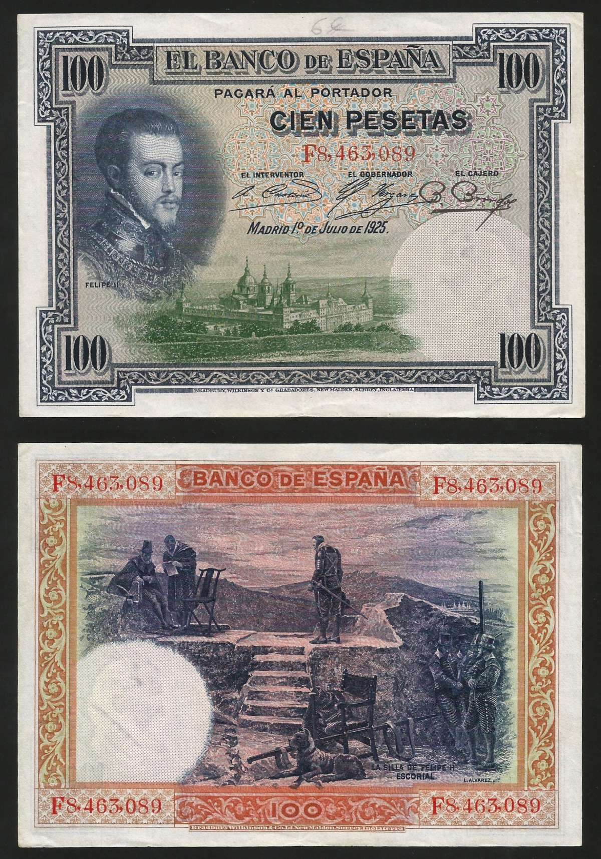 100 песет 1925 год Испания.